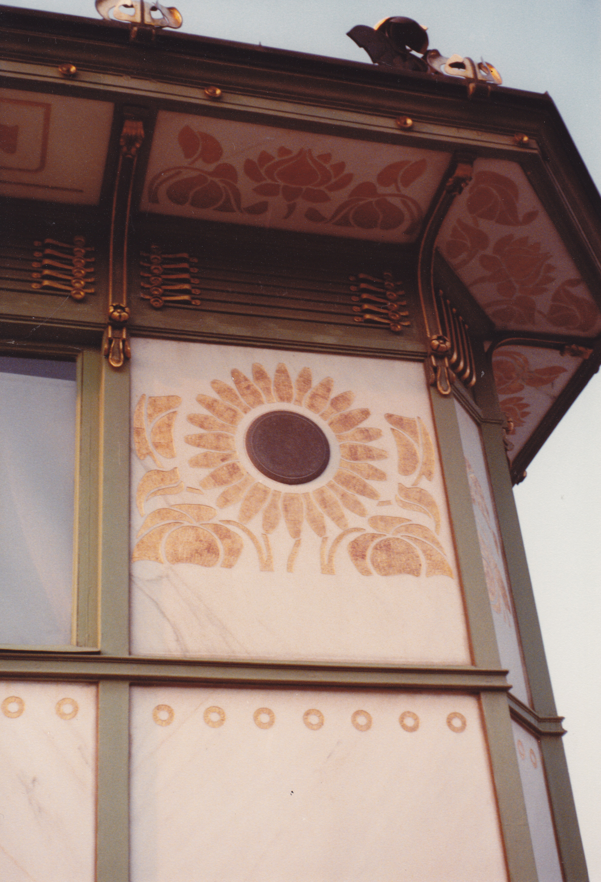 Autriche - Vienne - Station de métro Karlsplatz (architecte Otto Wagner)